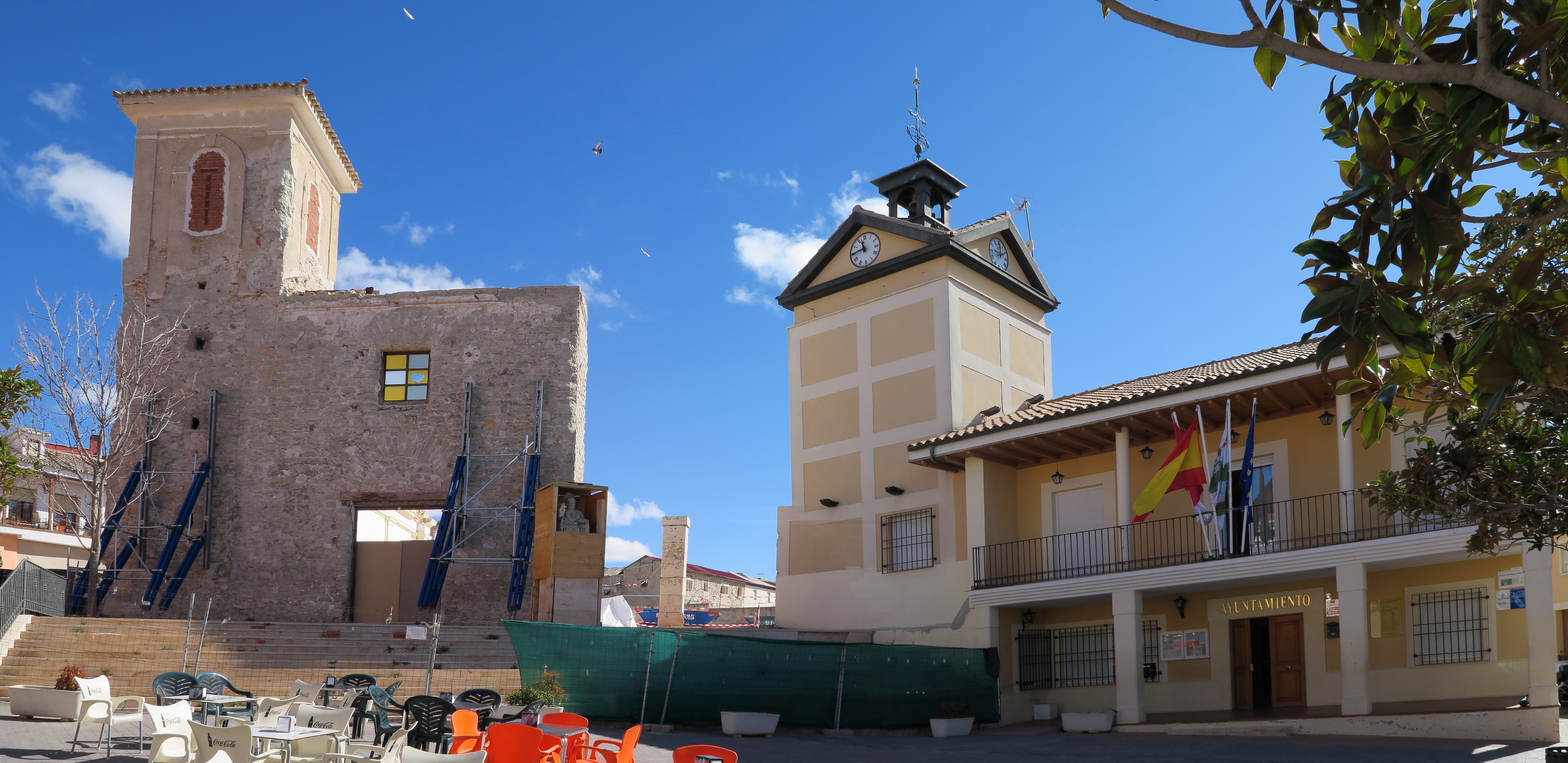 Ontígola, Plaza de la Constitución